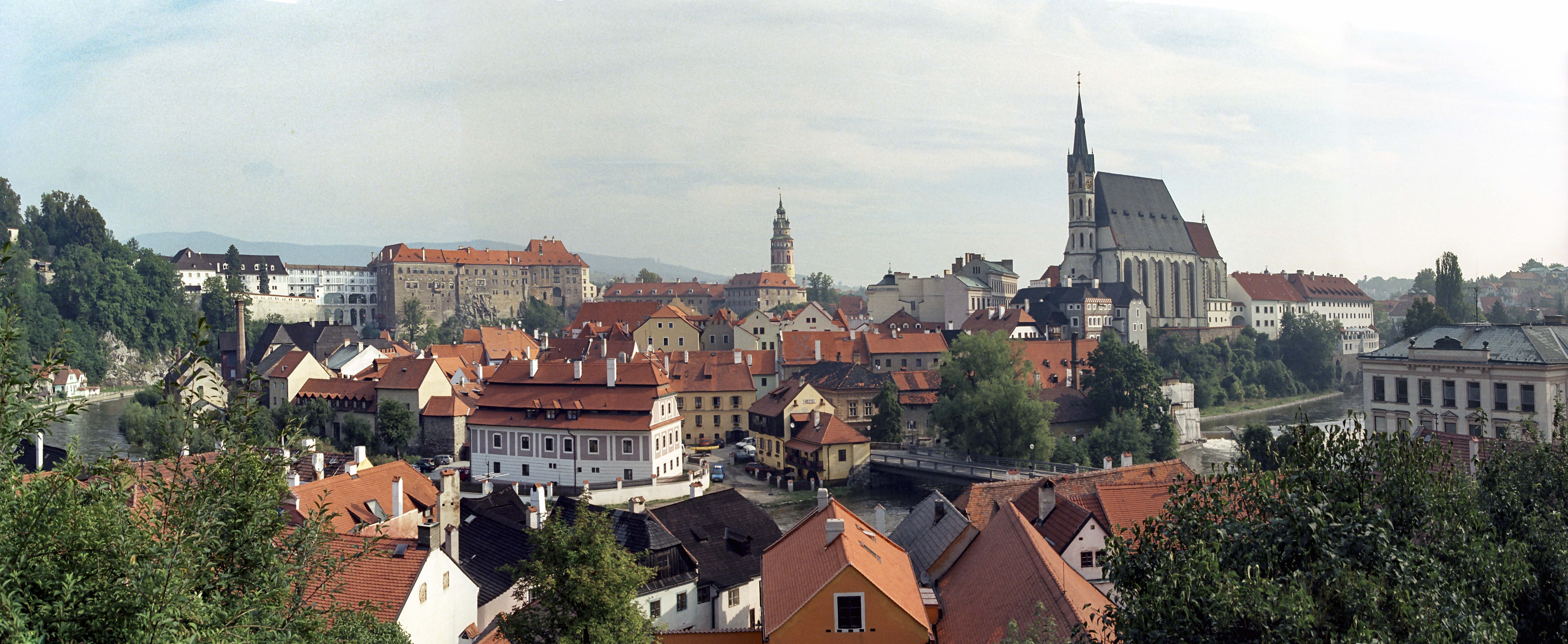 Cesky Krumlov, panorama